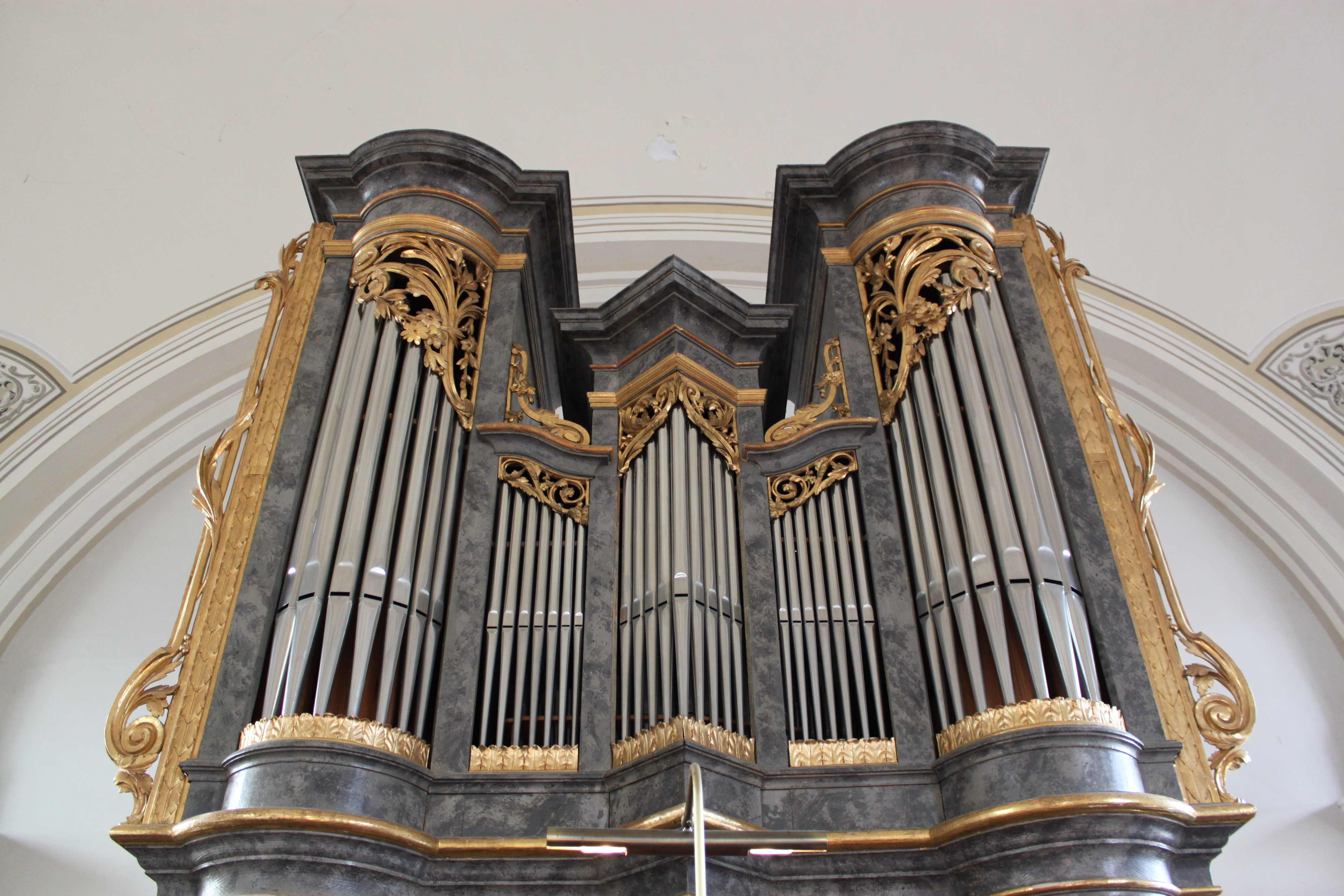 Orgel der evangelischen Kirche in Rust, Burgenland, Österreich